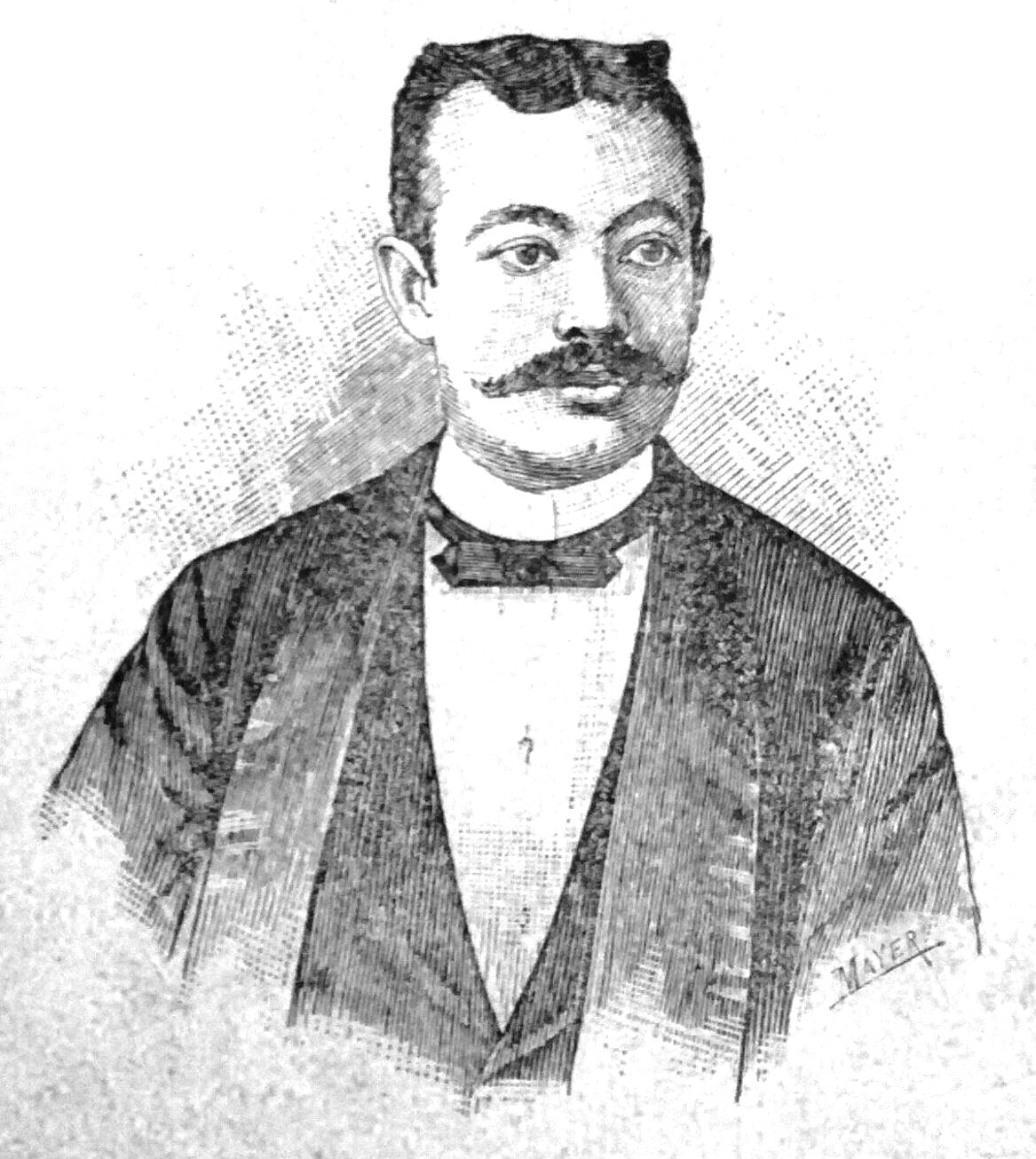 Gravado de Heraclio Pérez Placer feito por Enrique Mayer.